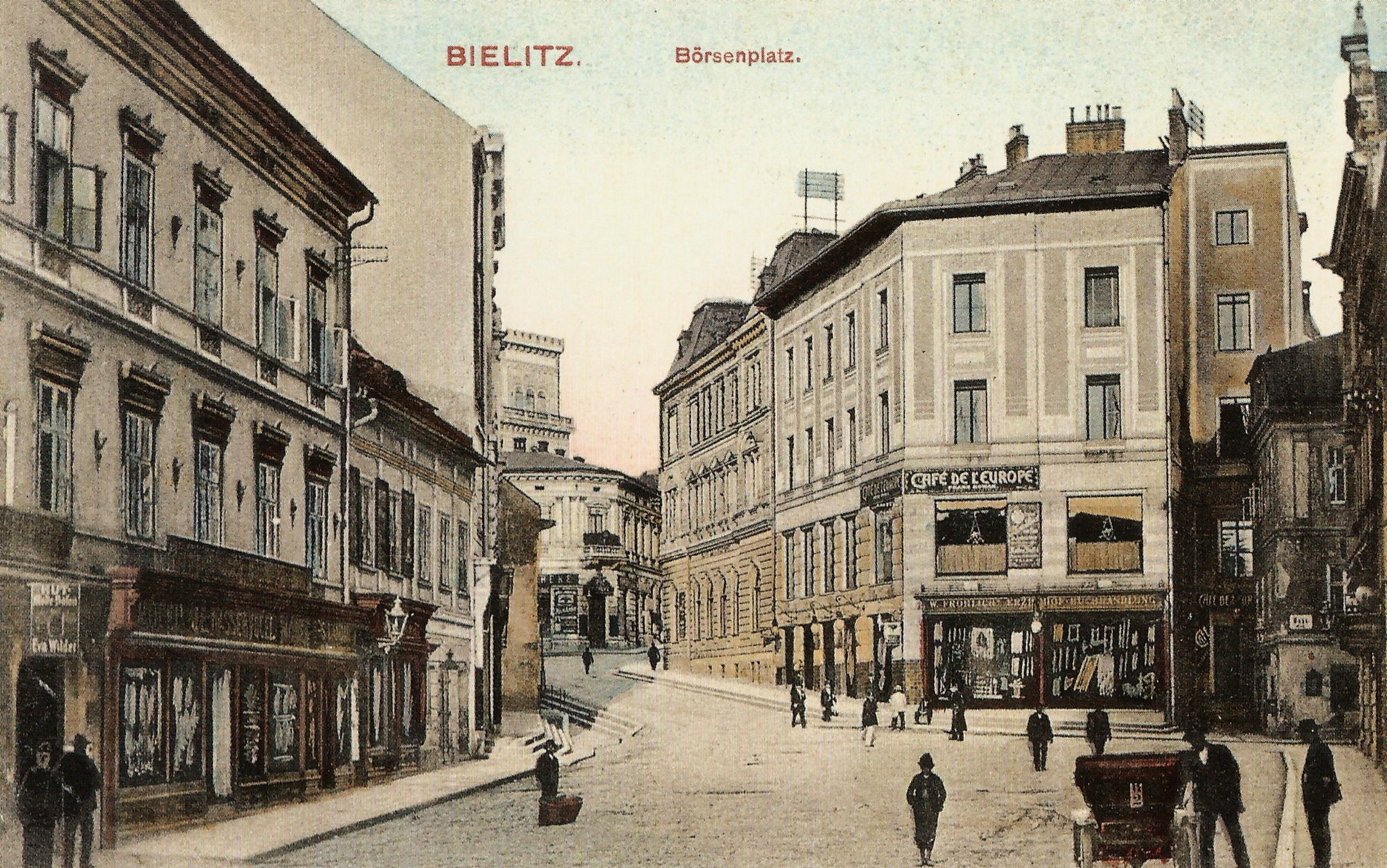 Bielsko-Biała, Börsenplatz (dziś pl. Franciszka Smolki)